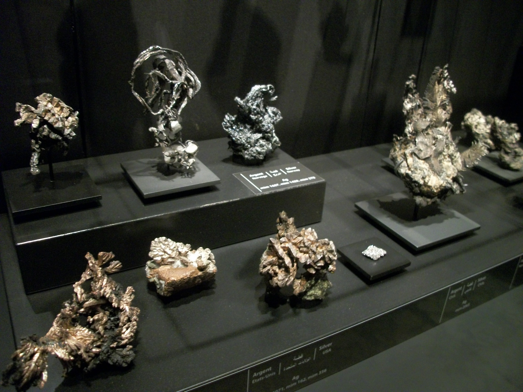 Collections de plusieurs argent natif